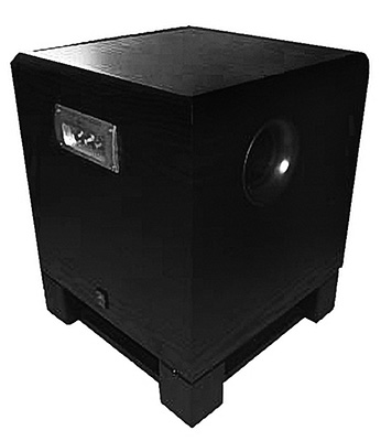 Subwoofer - hier Yamaha YST-800SW